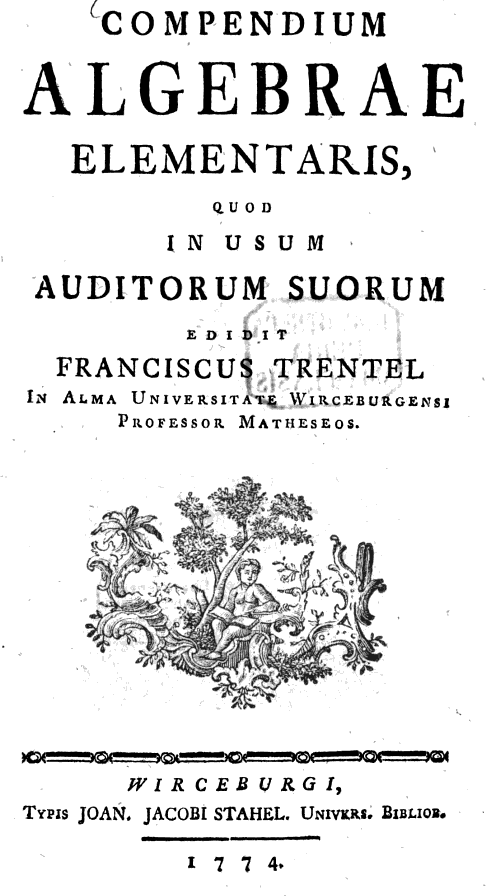 Franz Trentel, Jesuit, Mathematiklehrbuch